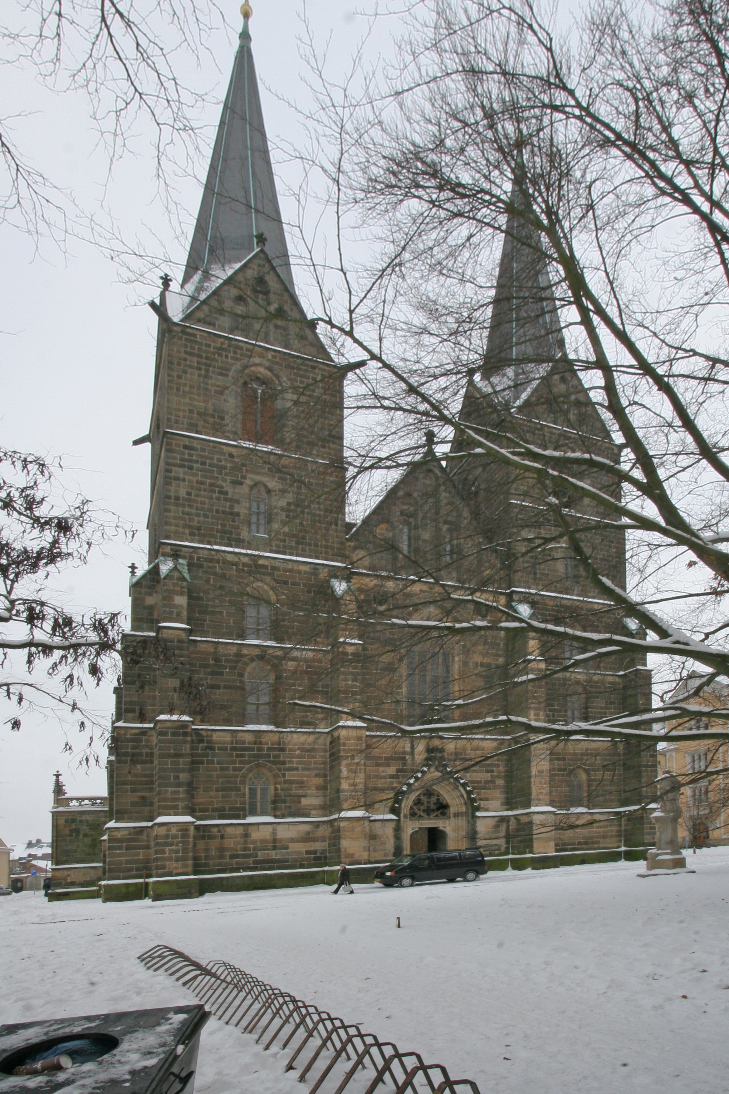 Kostel sv. Vavřince a zvonice (Vysoké Mýto), nám. Otakara Vaňorného, Vysoké Mýto